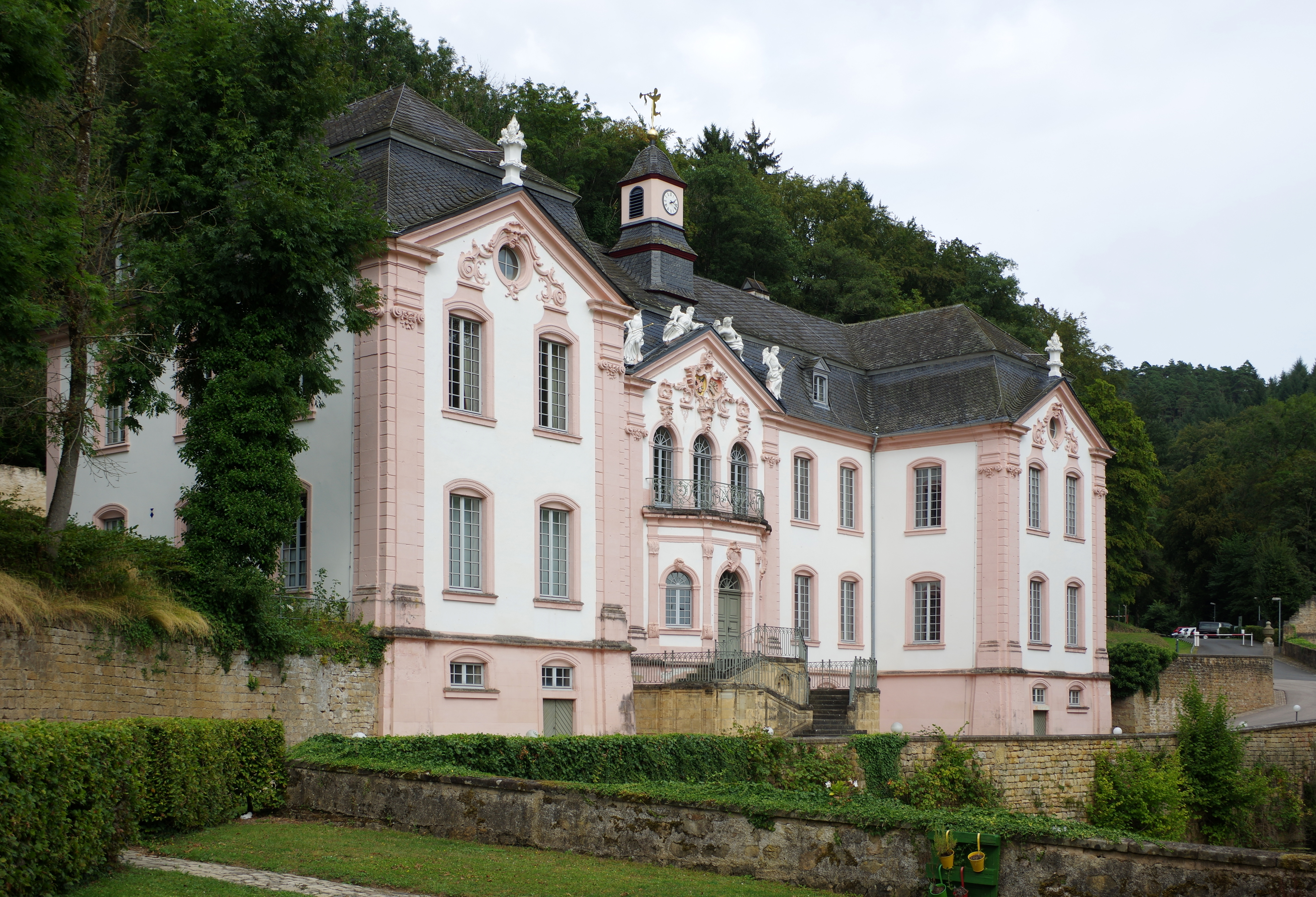 Schloss Weilerbach von Südwesten